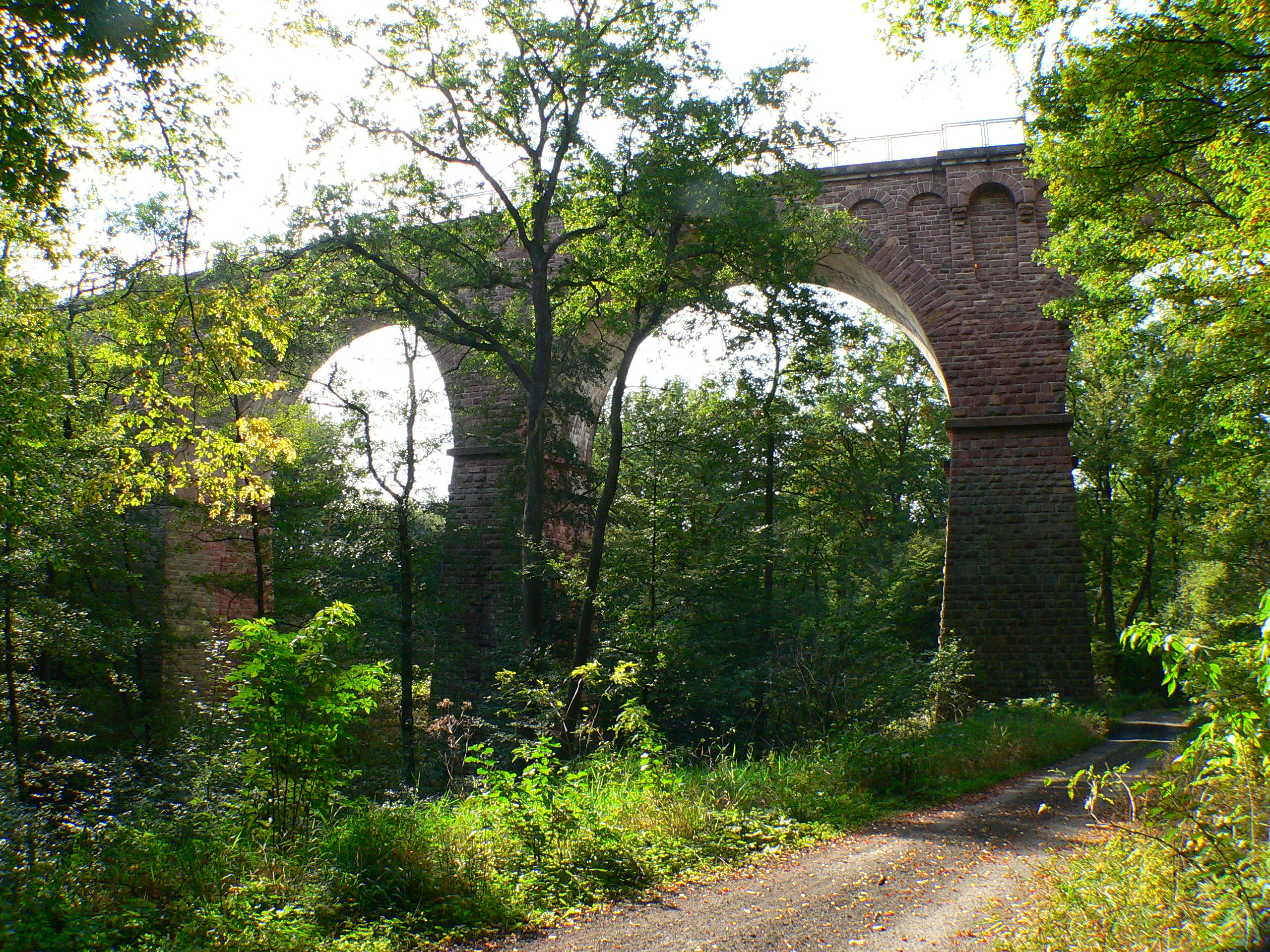 Ehemalige Rhön-Bahnstrecke „Hünfeld-Wenigentaft“: Klausmarbacher Viadukt bei Burghaun.